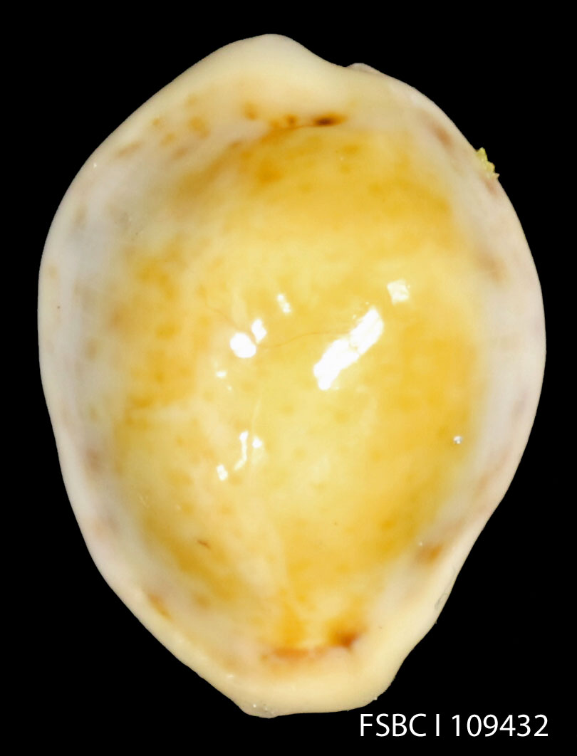 Scientific name: Erosaria acicularis'